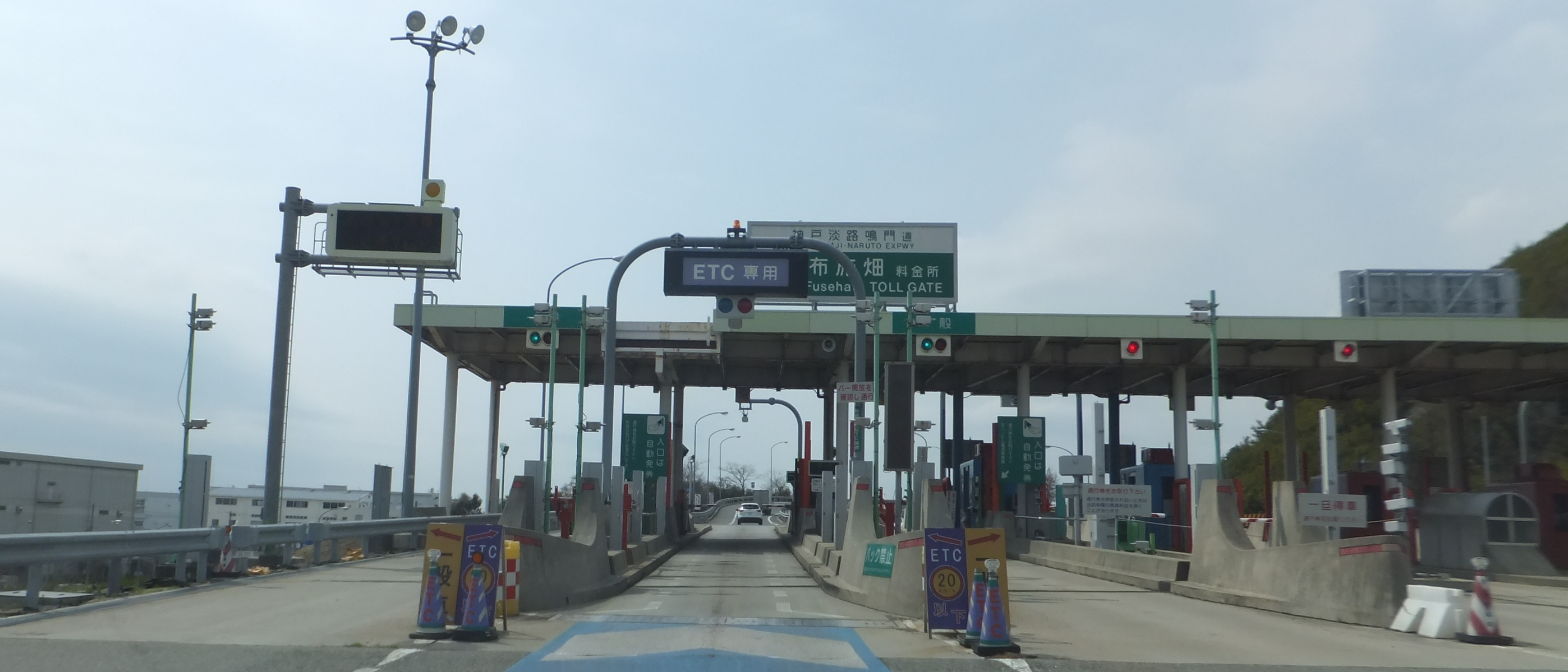 布施畑インターチェンジ